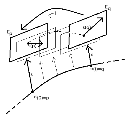 Trasporto di vettori lungo fibrati diversi